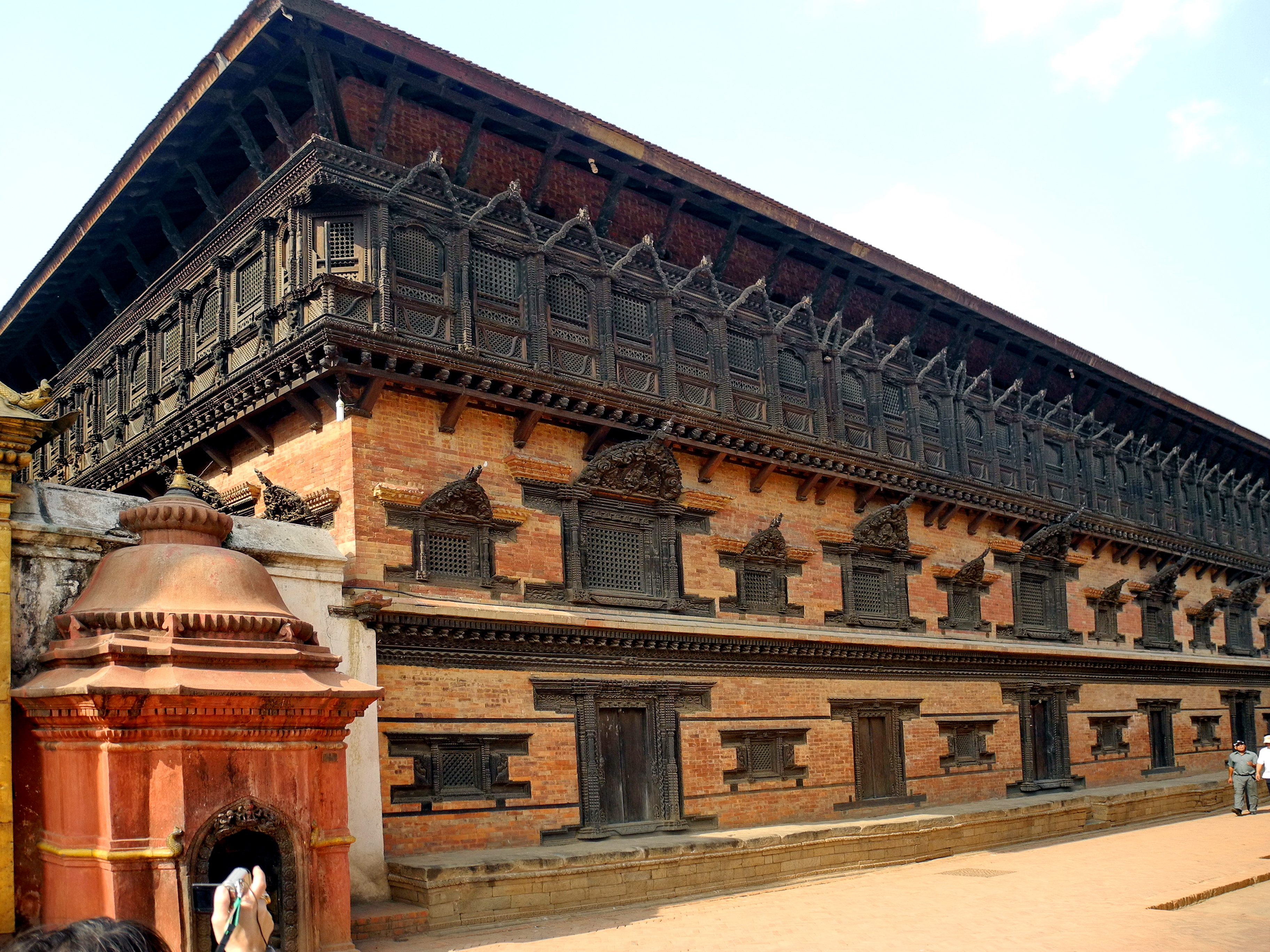 Palais royal aux 55 fenetres